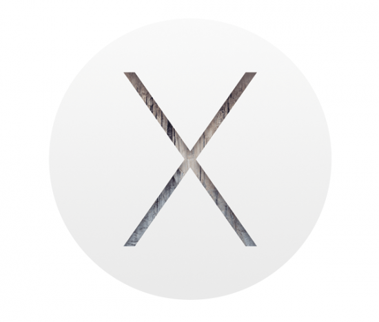 OS X Yosemite Logo oficial Apple